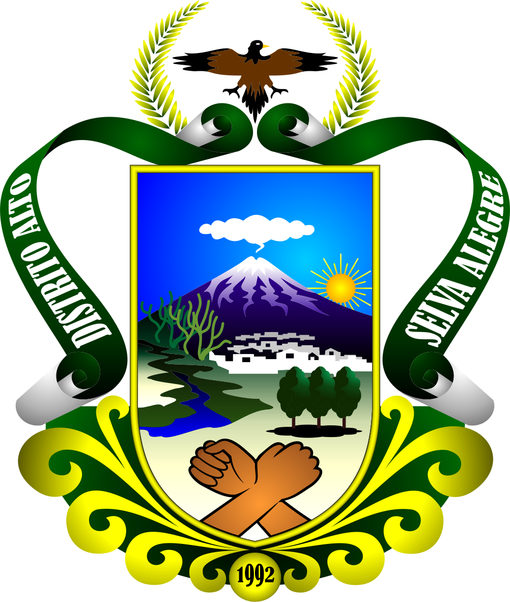 Distrito de Alto Selva alegre - Provincia de Arequipa - Región Arequipa